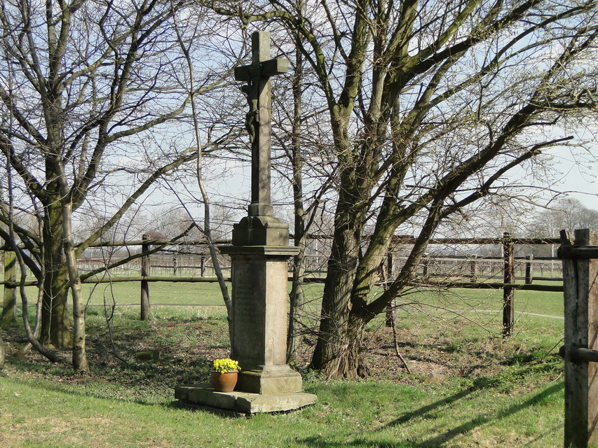 Das Richarz-Kreuz genannte Wegekreuz befindet sich an der Gutseinfahrt zum Gut Ettenhausen (Ettenhausener Straße 91).